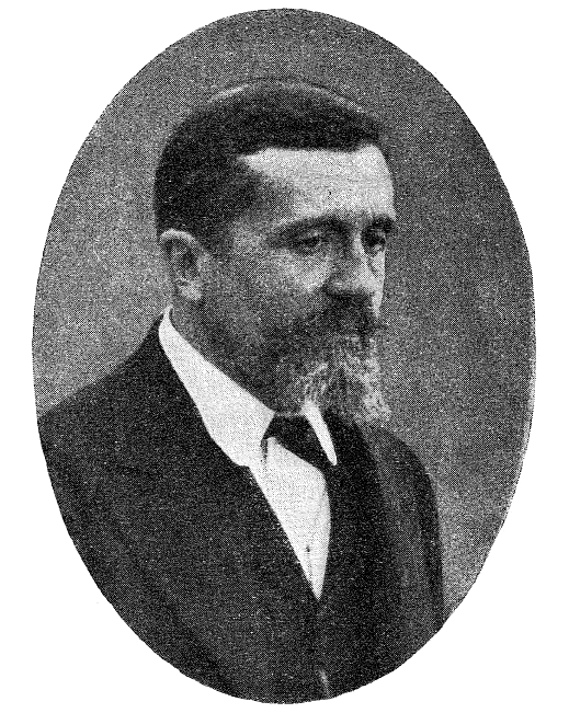 Portrait de l'astronome et mathématicien français Louis Fabry (1862-1939)